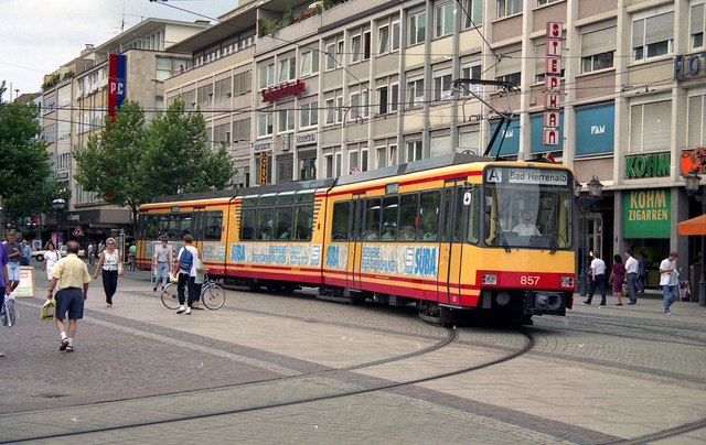 Tram at Karlsruhe Marktplatz